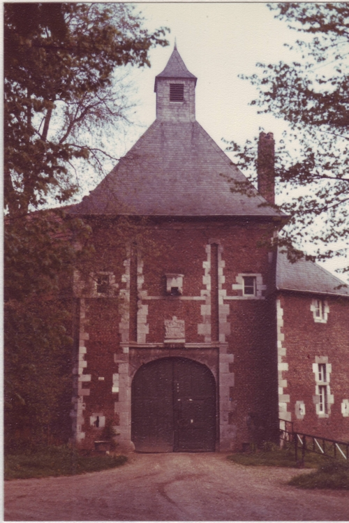 Schloß Leerodt